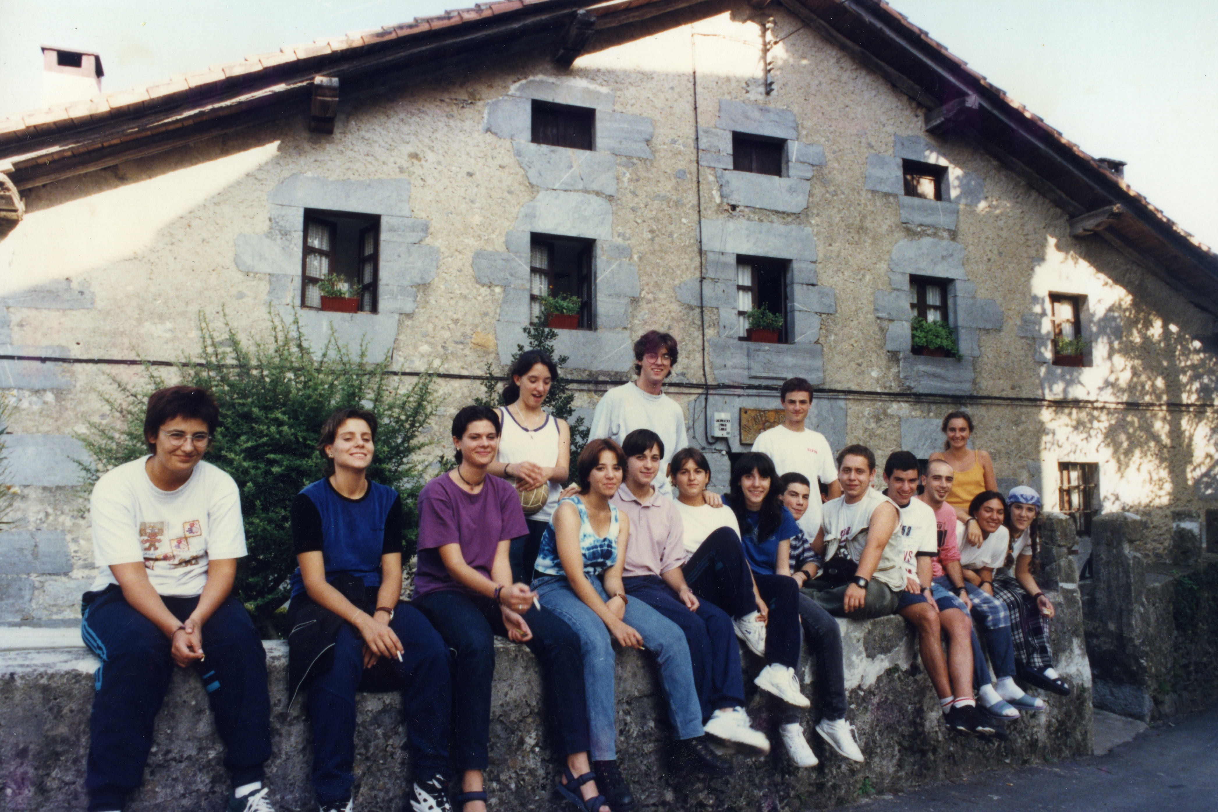 Aiurri 65 zbk. 3. orr.